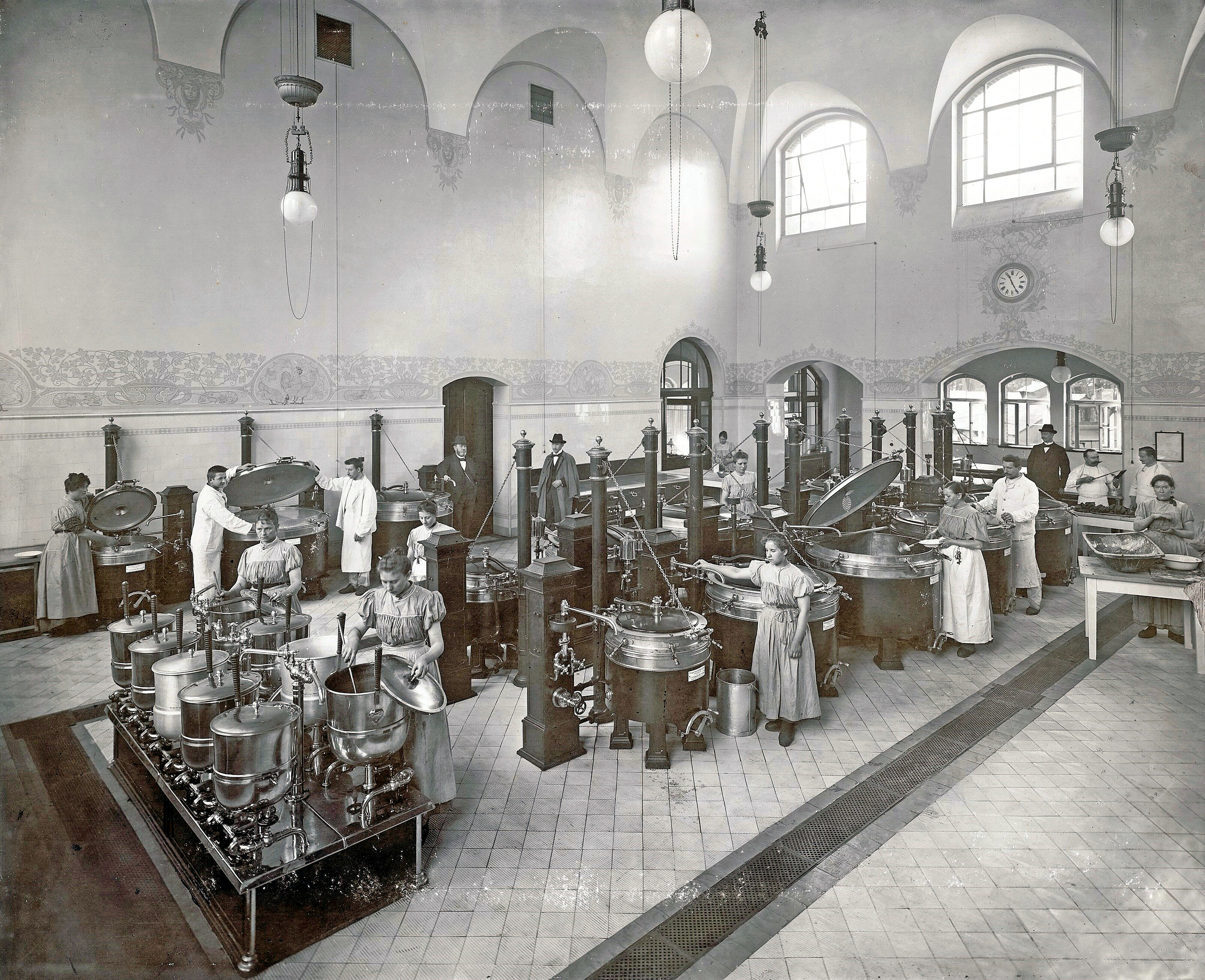 Dampfküche der Charité